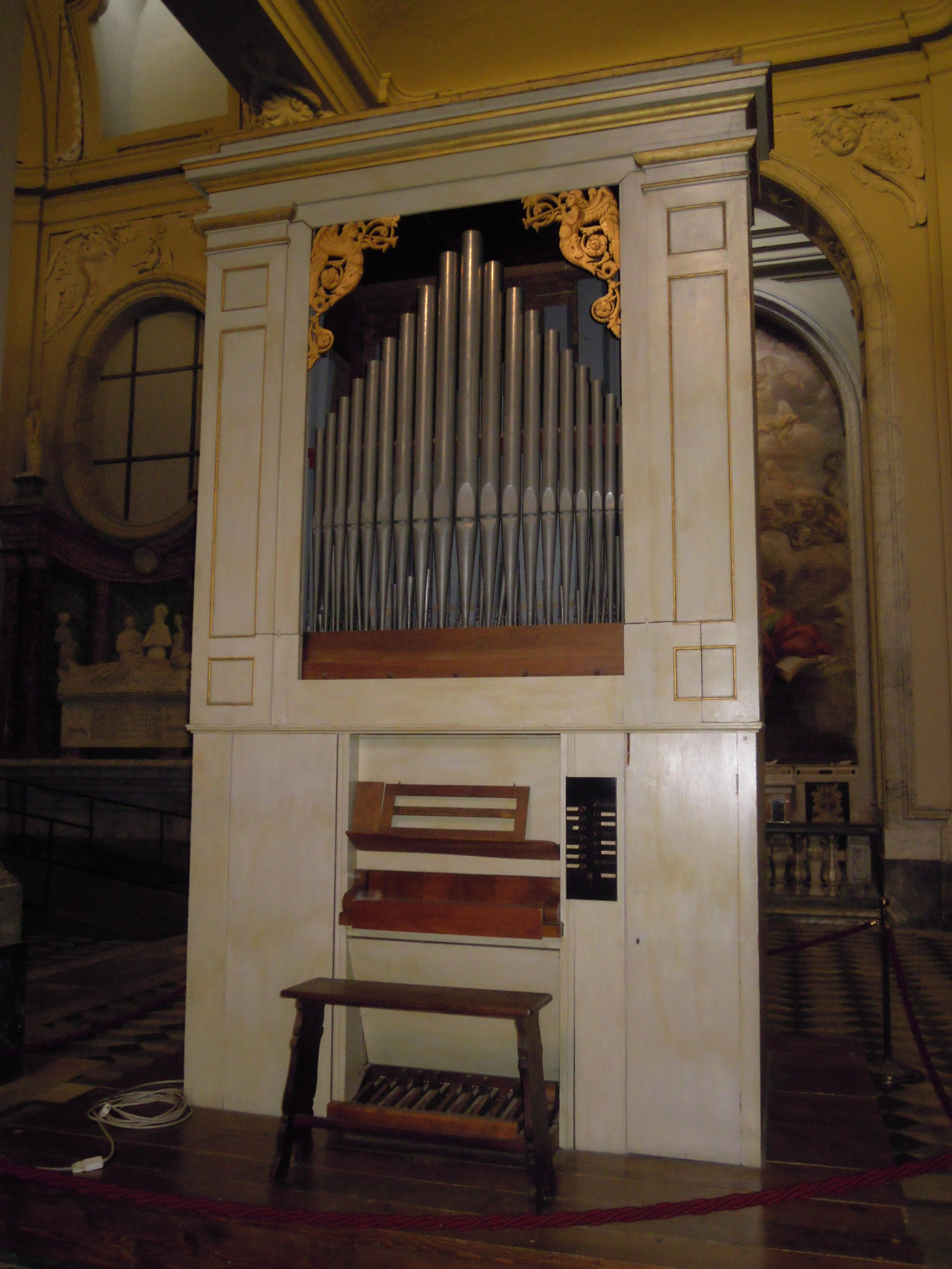 L'organo Angelo Morettini (I+P/15) nella basilica di San Giovanni in Laterano a Roma